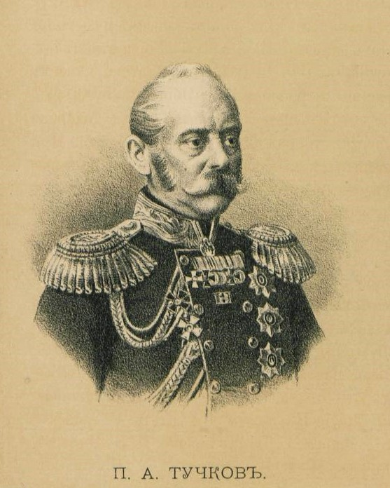 Тучков, Павел Алексеевич (градоначальник Москвы)